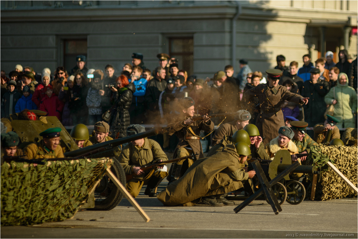 Представление исторических реконструкторов. Парад Памяти, Самара, 2013